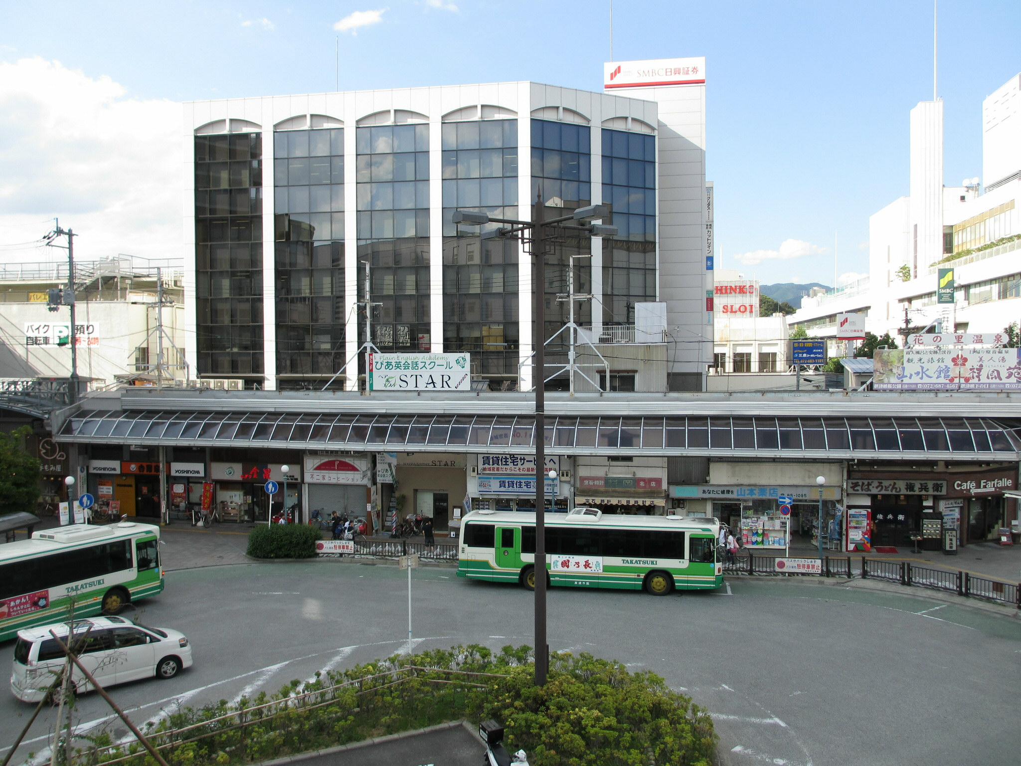 JR Takatsuki Station